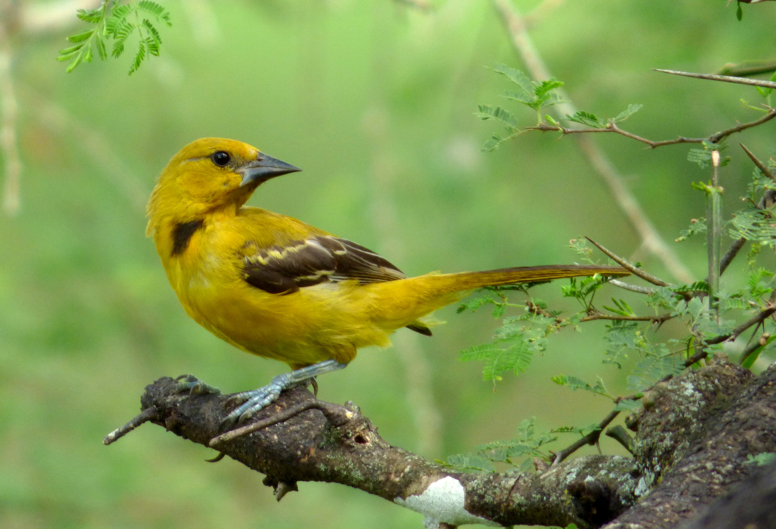 Icterus nigrogularis (Turpial amarillo)